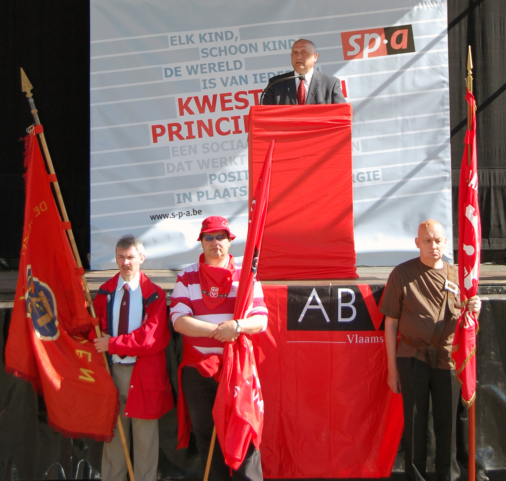 Speech of ABBV chairman Rudy De Leeuw on Workers Day in Leuven, Belgium.